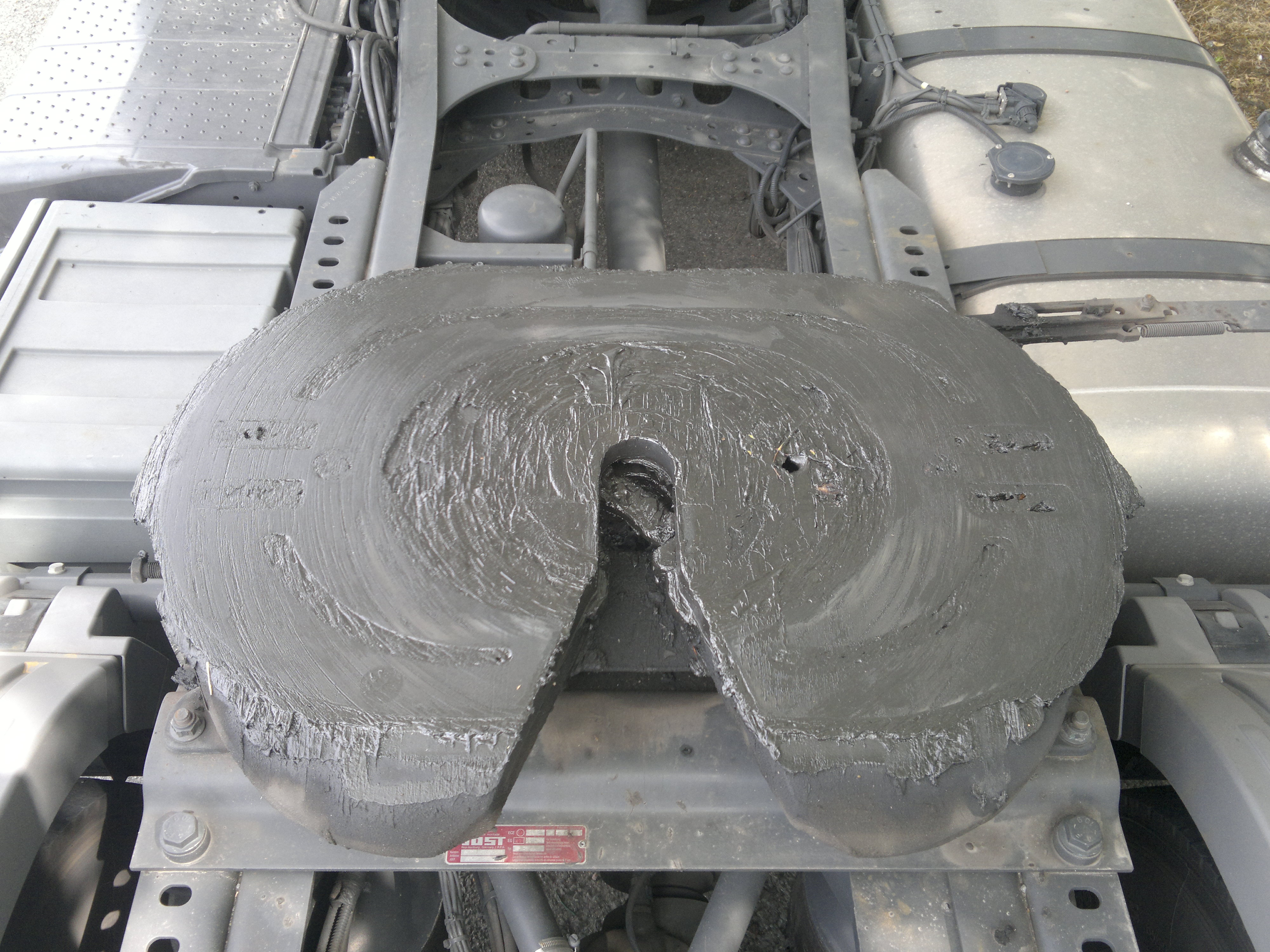 Sellette de tracteur routier.